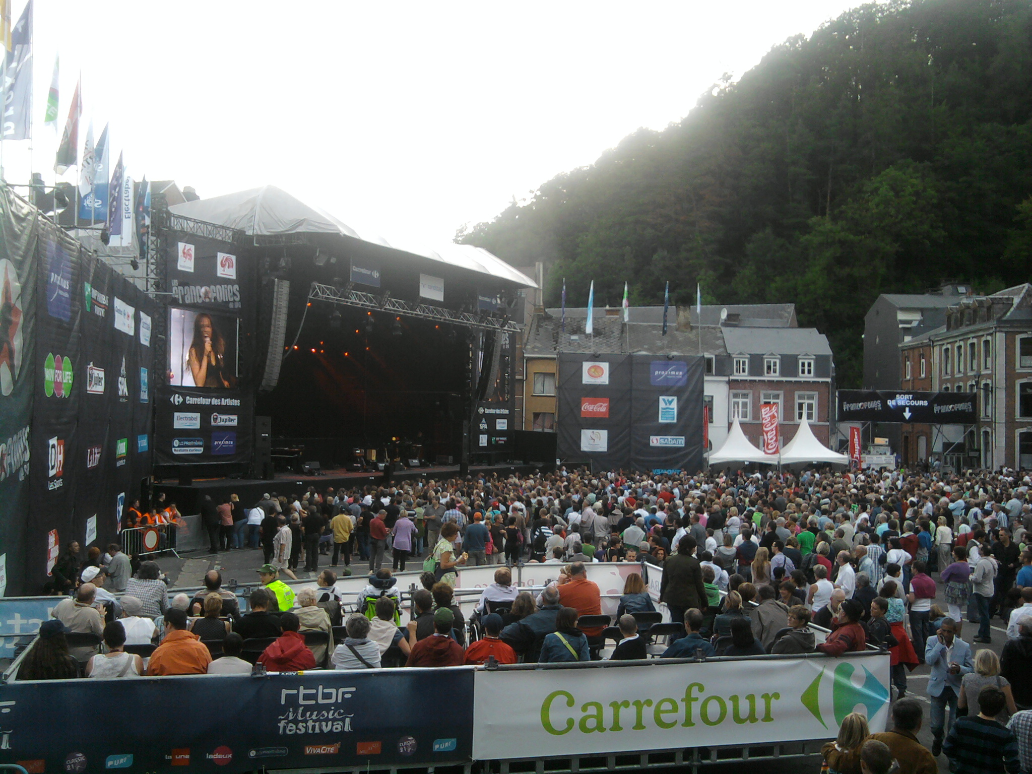 Concert sur la Scène Pierre Rapast aux Francofolies de Spa